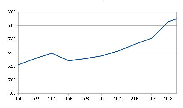 Gráfico con la evolución de la población en el municipio de Betxí (Castellón)